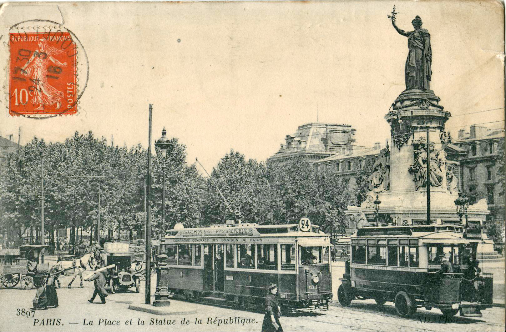 Carte postale ancienne éditée par ND 3897 :PARIS - La Place et la Statue de la République